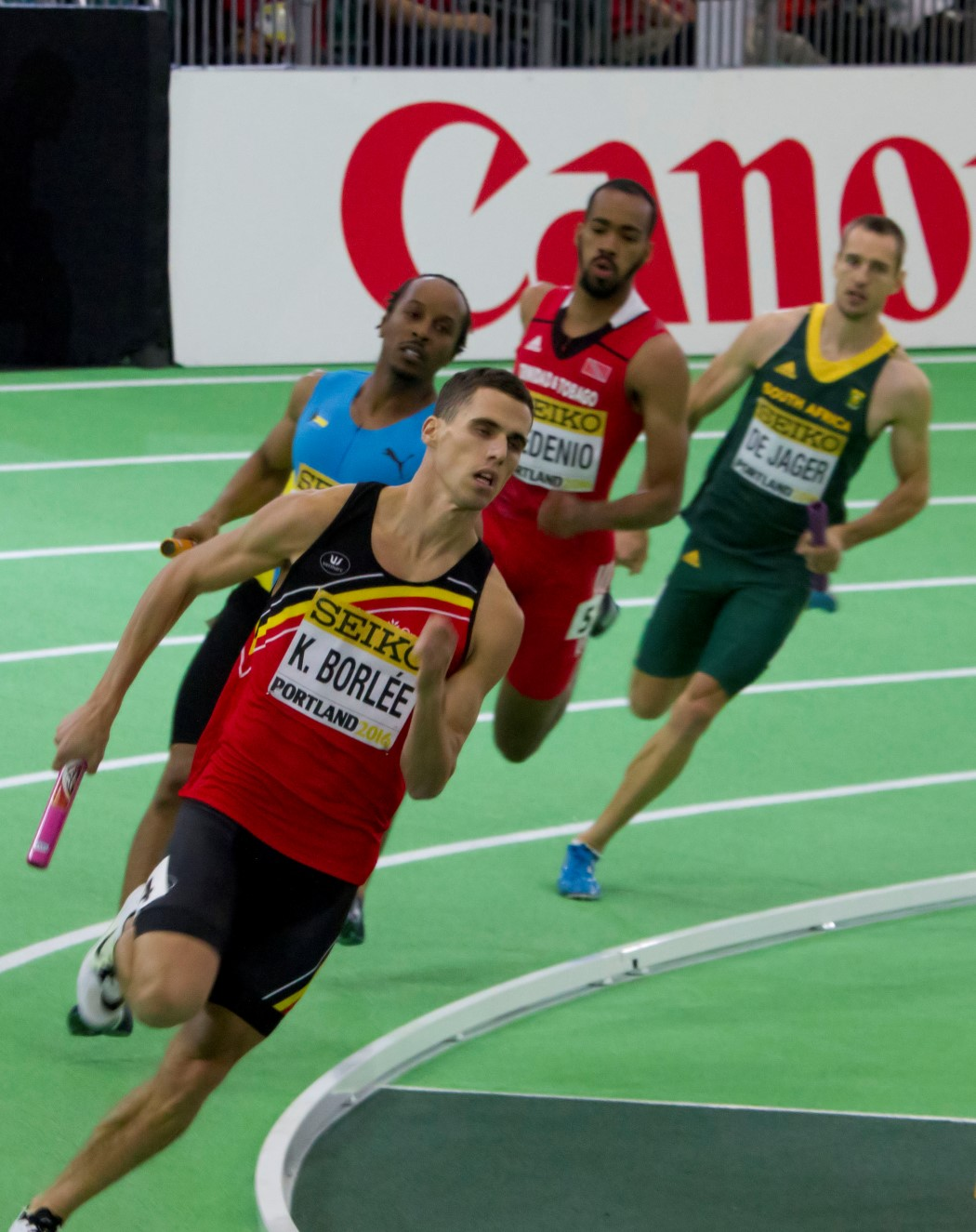 402 reeksen 4x400 kevin borlee